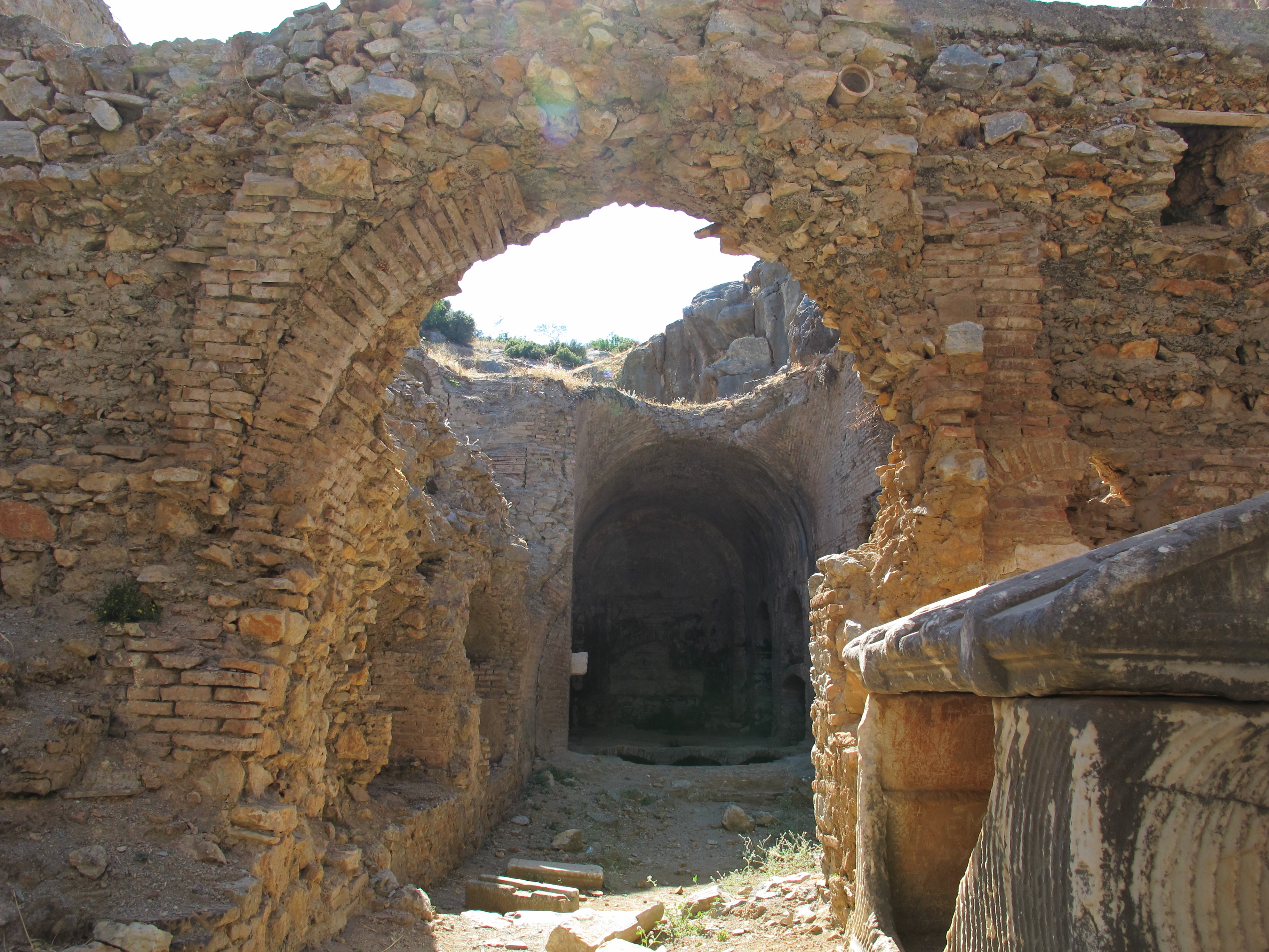 Efeso, grotta dei sette dormienti